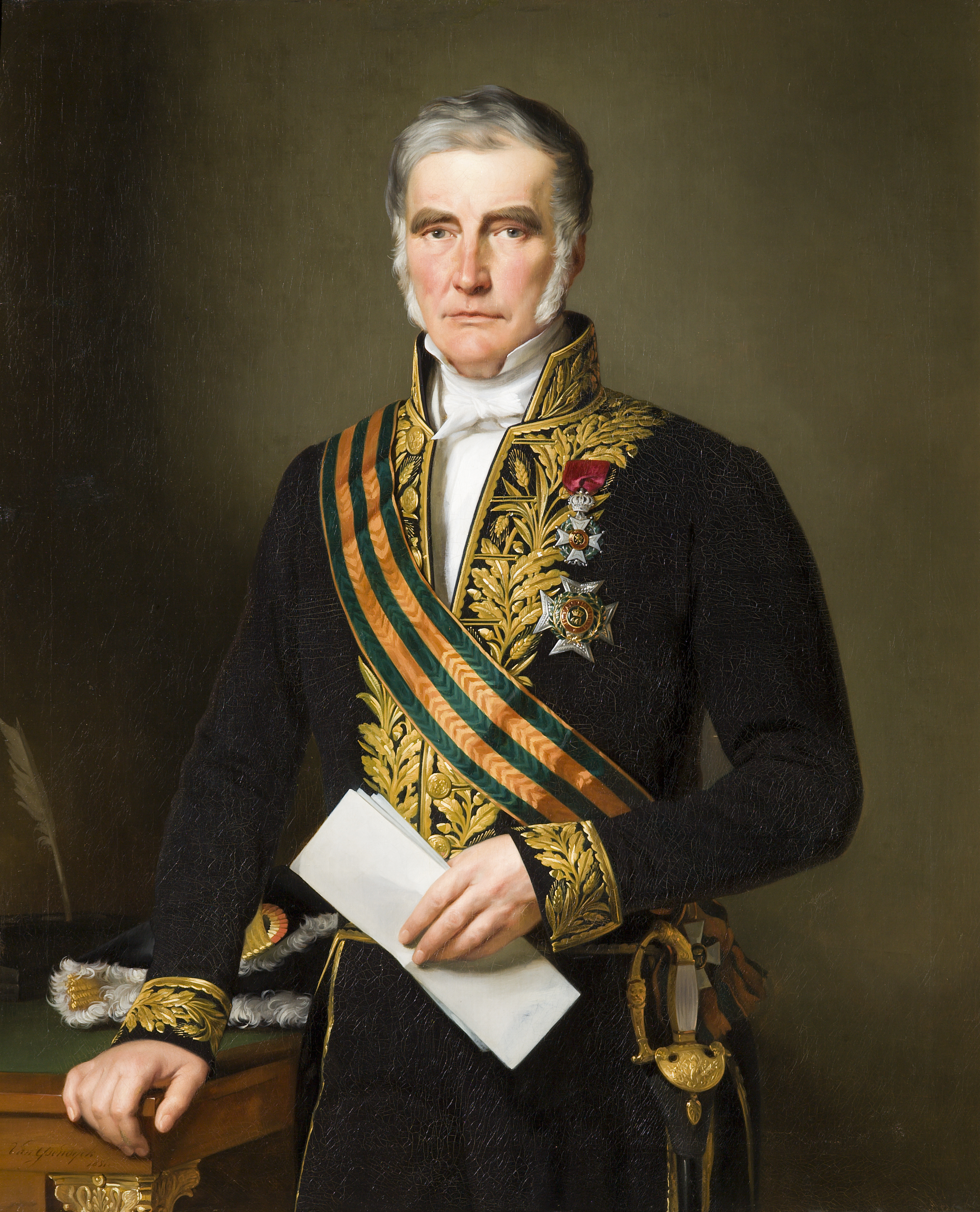 Portret van Augustin Dumon-Dumortier, voorzitter van de Senaat (1848 - 1852)